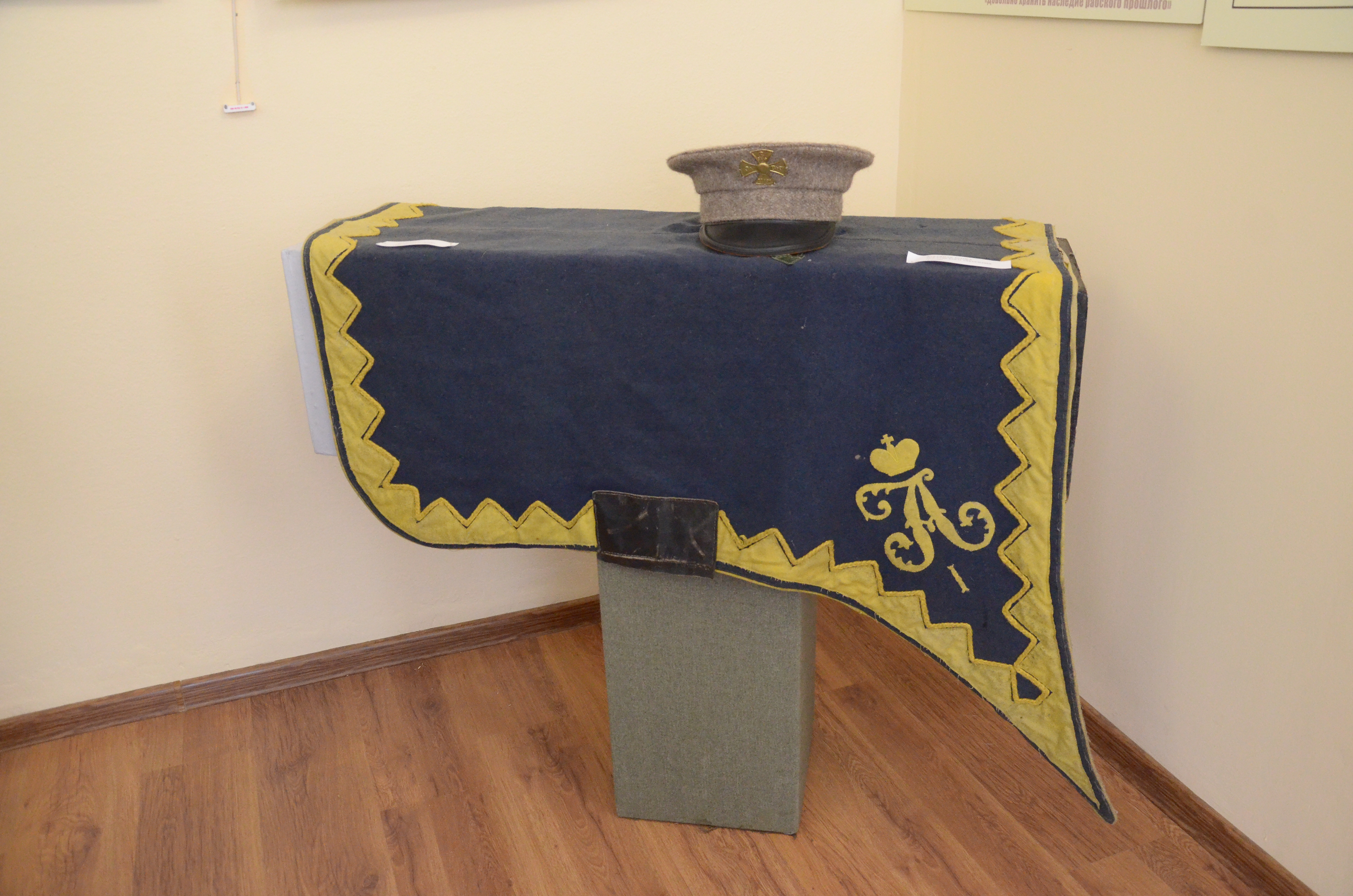 Выставка «Бородинское поле» в донецком художественном музее. Подготовлена музеем-заповедником «Бородинское поле».